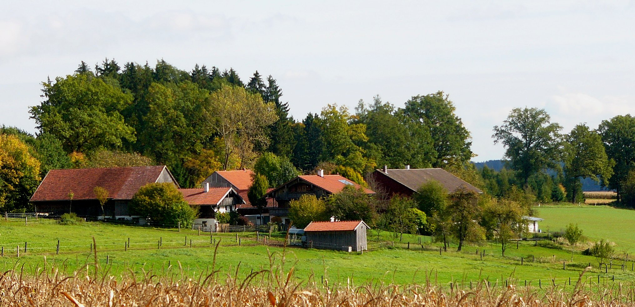 Blick auf Kreut, Ortsteil von Essenbach.